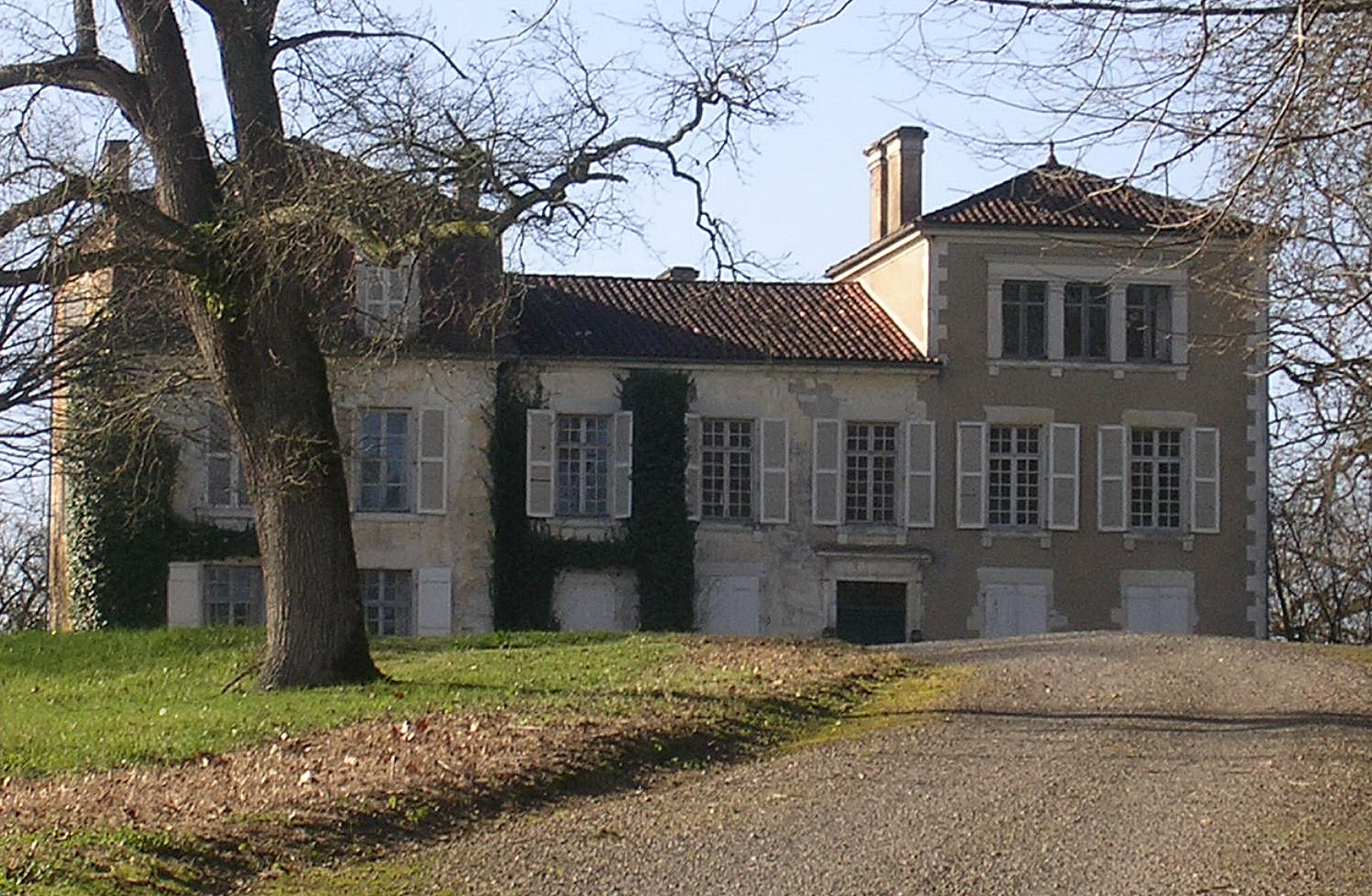 Château de Navailles, à Dumes (Landes, France)